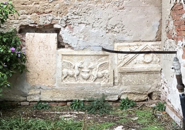 Marmi romani